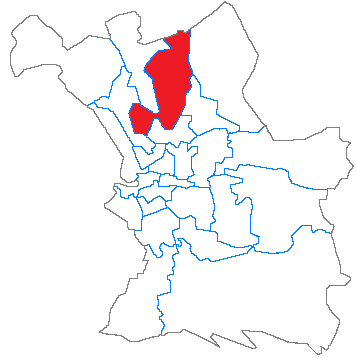 Situation du canton dans la ville de Marseille